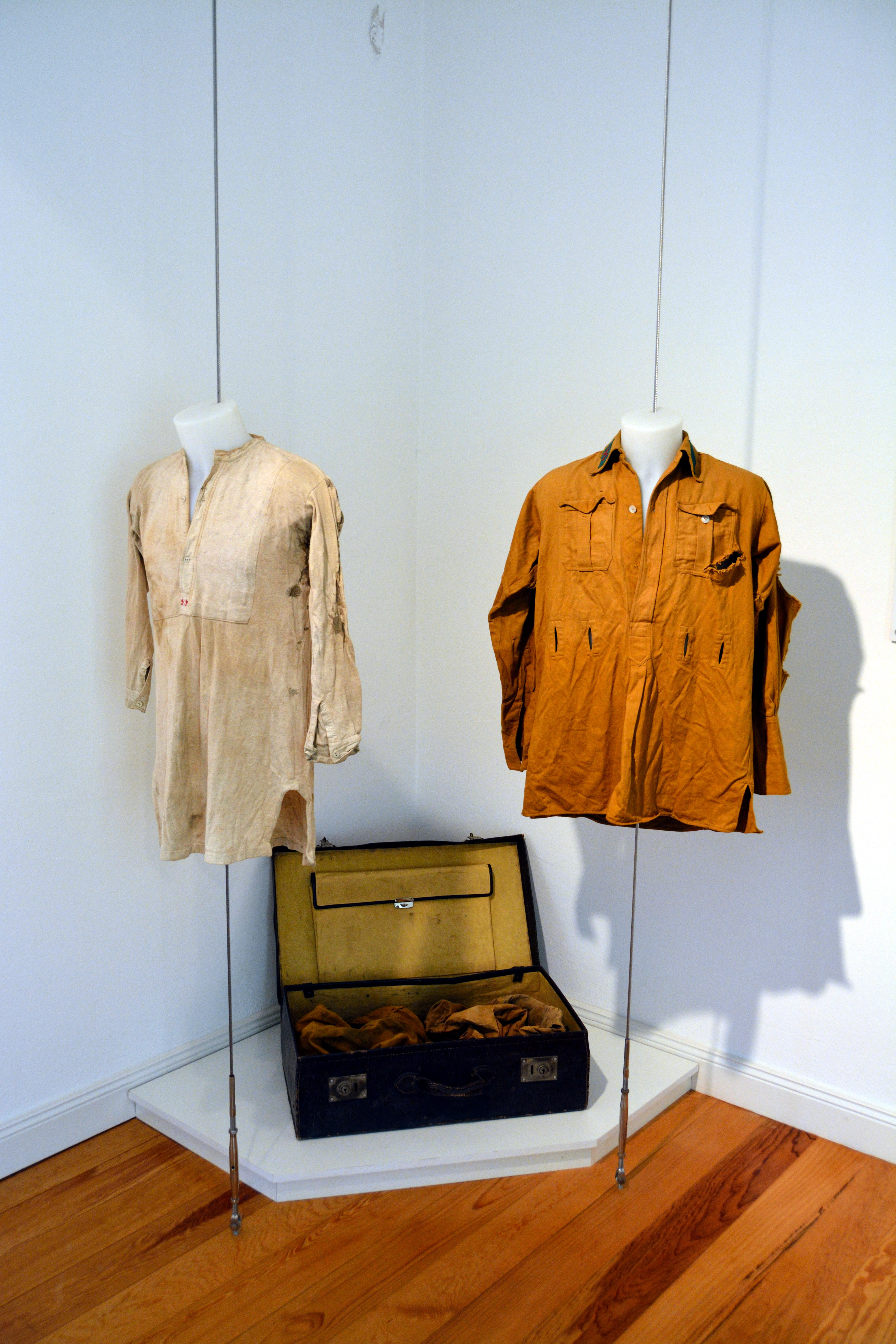 Impressionen aus dem Dithmarscher Landesmuseum Blutnacht von Wöhrden